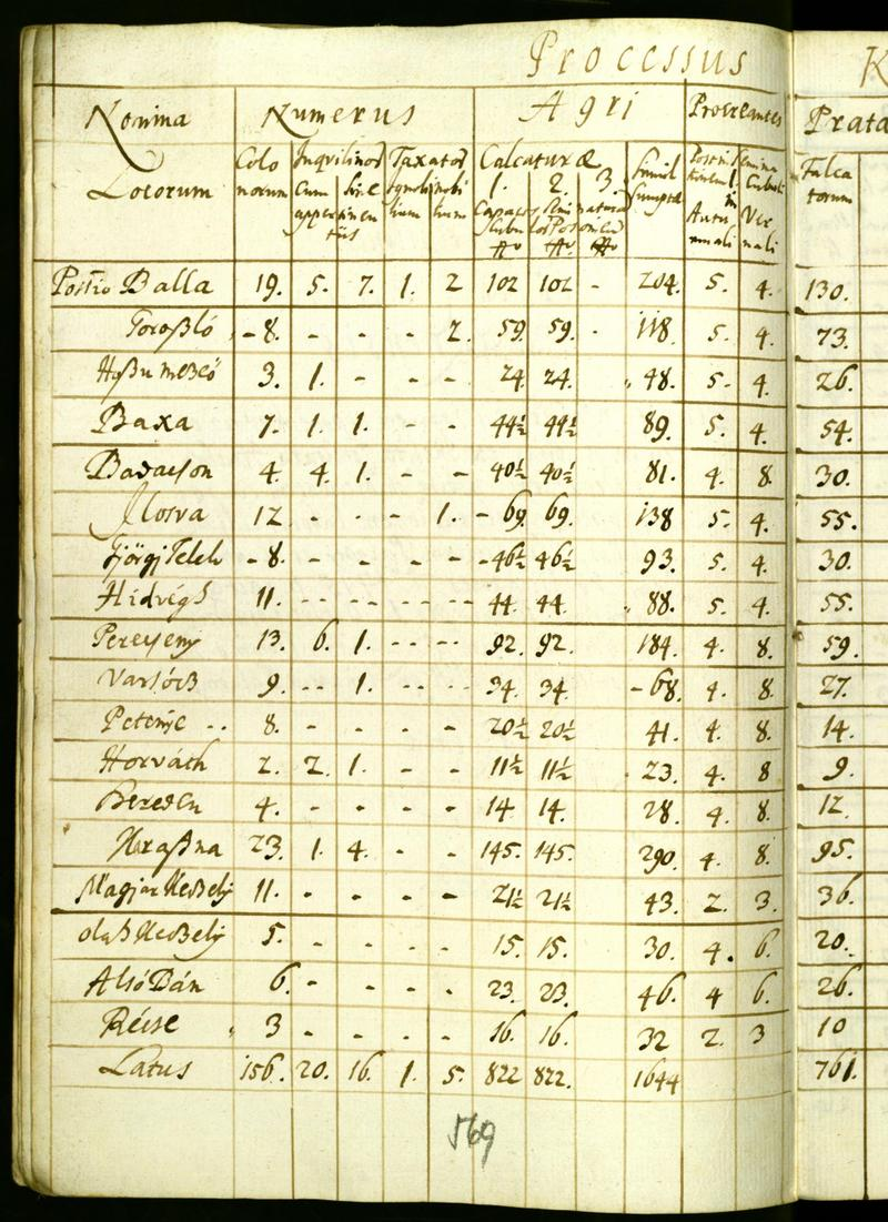 Census 1715 in Giurtelecu Simleului